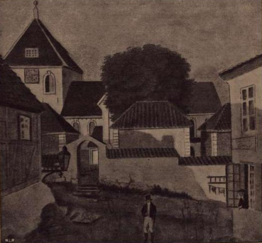 Norwegian: De gamle gravkapellene ved Vor frelsers kirke i Christiania (i dag Oslo domkirke).title QS:P1476,no:"De gamle gravkapellene ved Vor frelsers kirke i Christiania (i dag Oslo domkirke)." label QS:Lno,"De gamle gravkapellene ved Vor frelsers kirke i Christiania (i dag Oslo domkirke)."